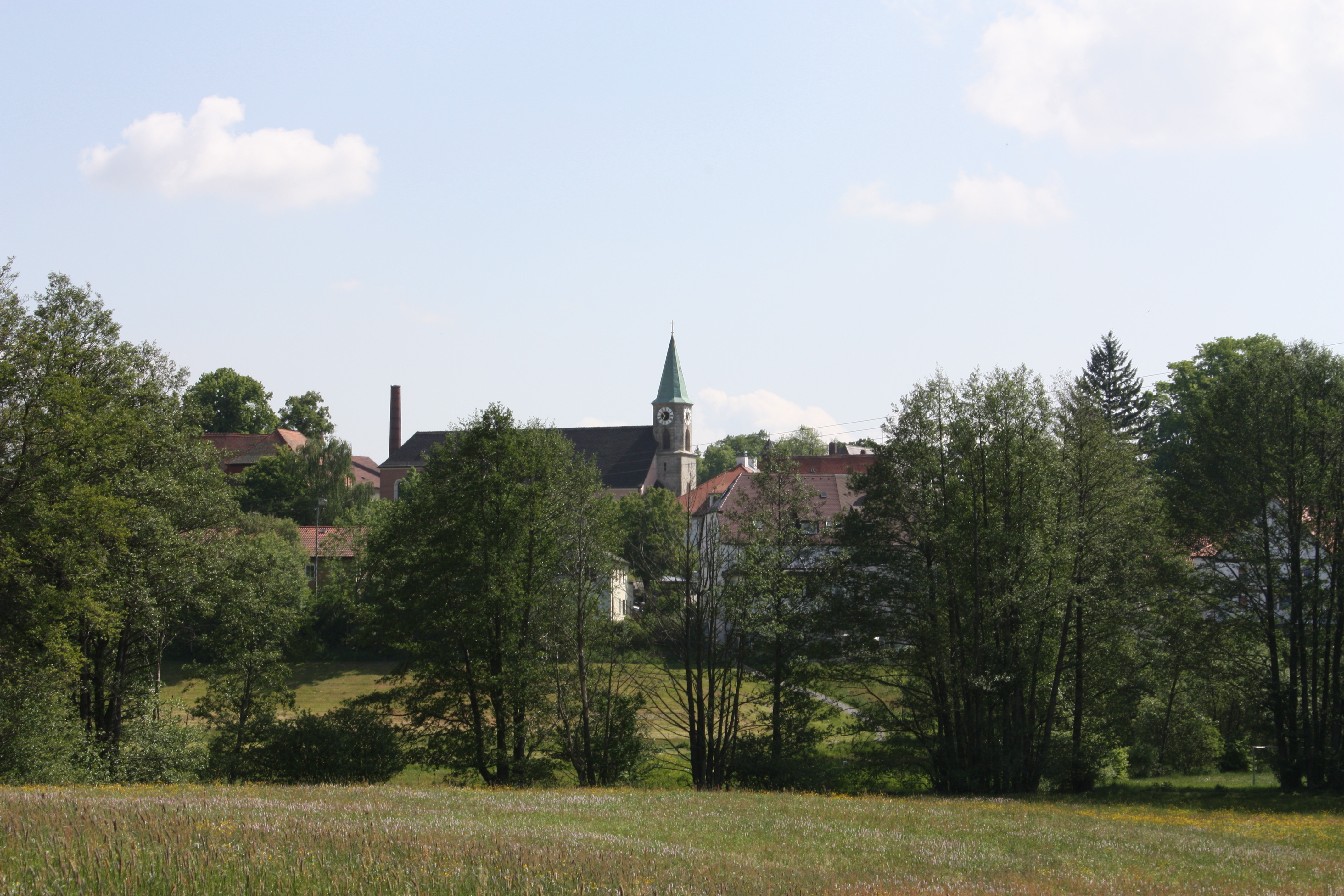 Friedenfels